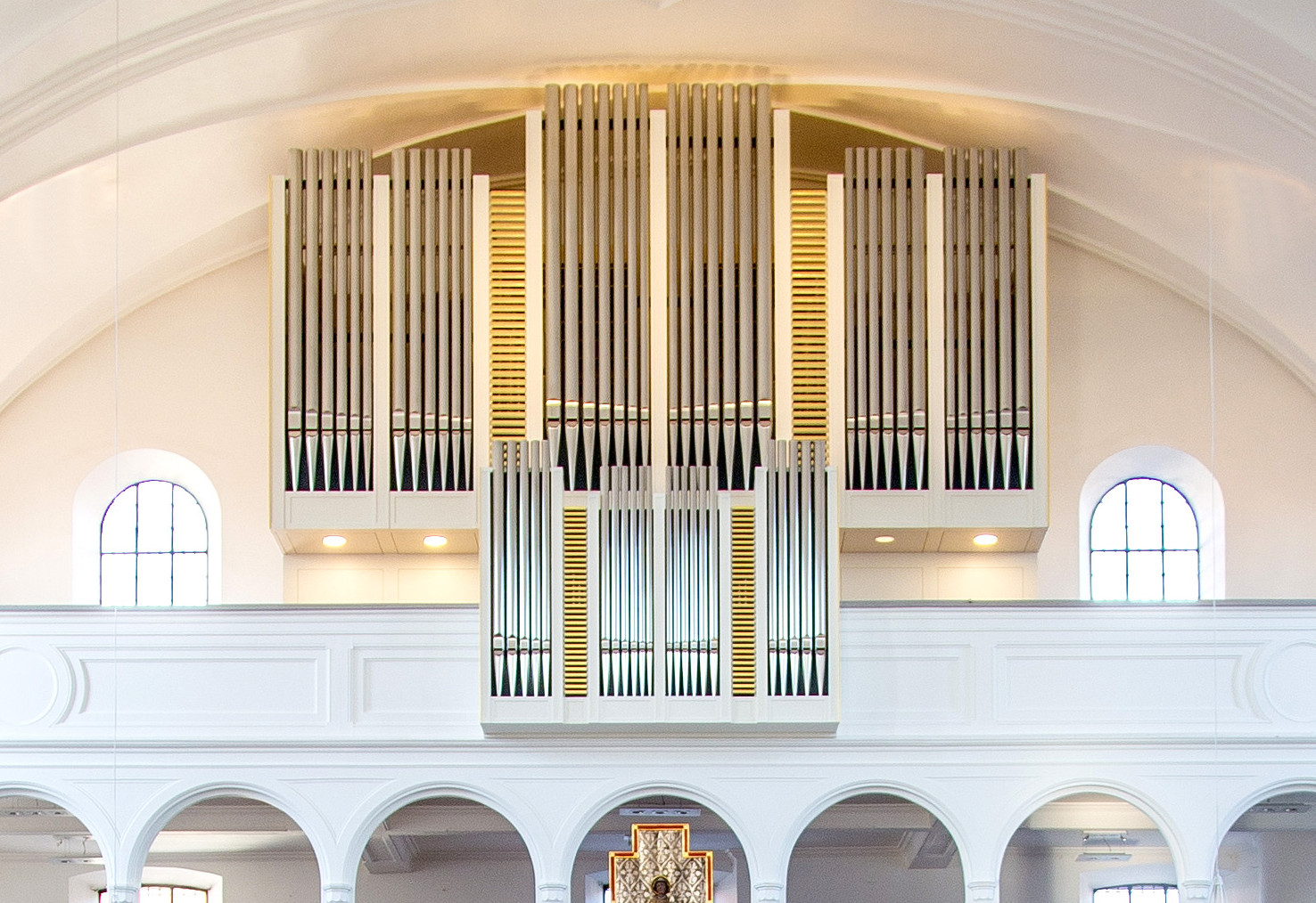 Aufnahme der neuen Stephanus-Orgel auf der zweiten Empore